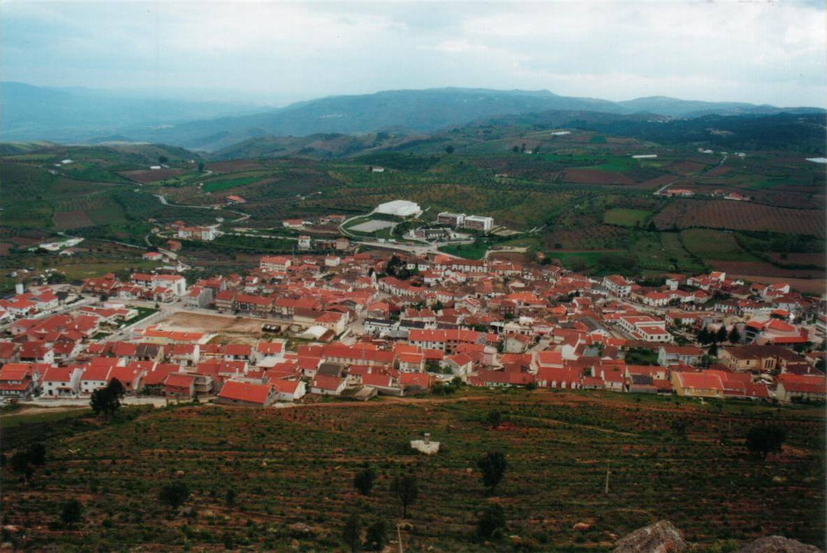 Fotografia tirada por mim e posteriormente digitalizada